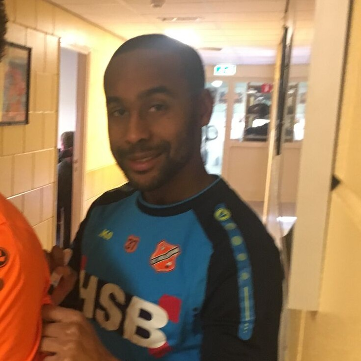 Luís Pedro in februari 2018.